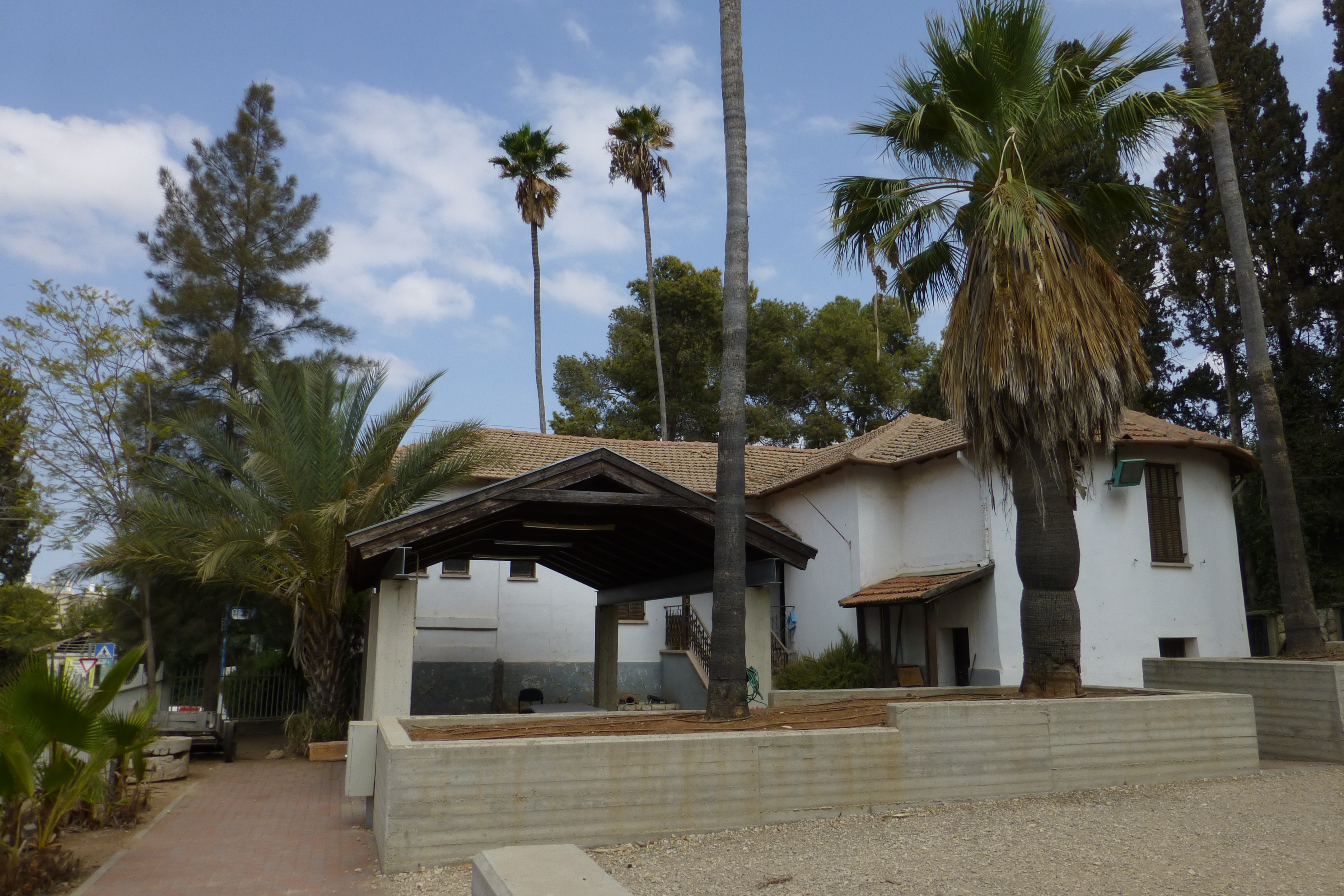 נבנה ב1924, על ידי משה ורחל מינץ. שימש בחלקו המערבי כבית מגורים ובחלקו המזרחי כבית עם. כיום הוא משכנו של מוזיאון לתולדות גדרה והביל"ויים.